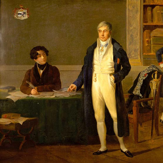 Alexis de Tocqueville (1805-1859) et son père Hervé (1772-1856)